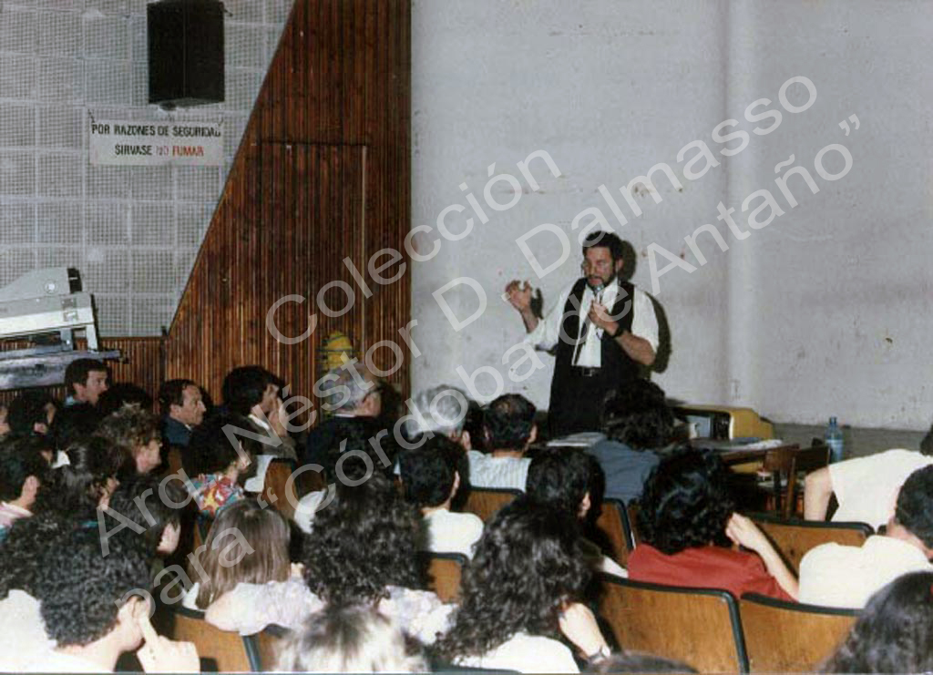 Livio Incatasciato 10 FAUD Córdoba -Rep. Argentina- 1996-1P